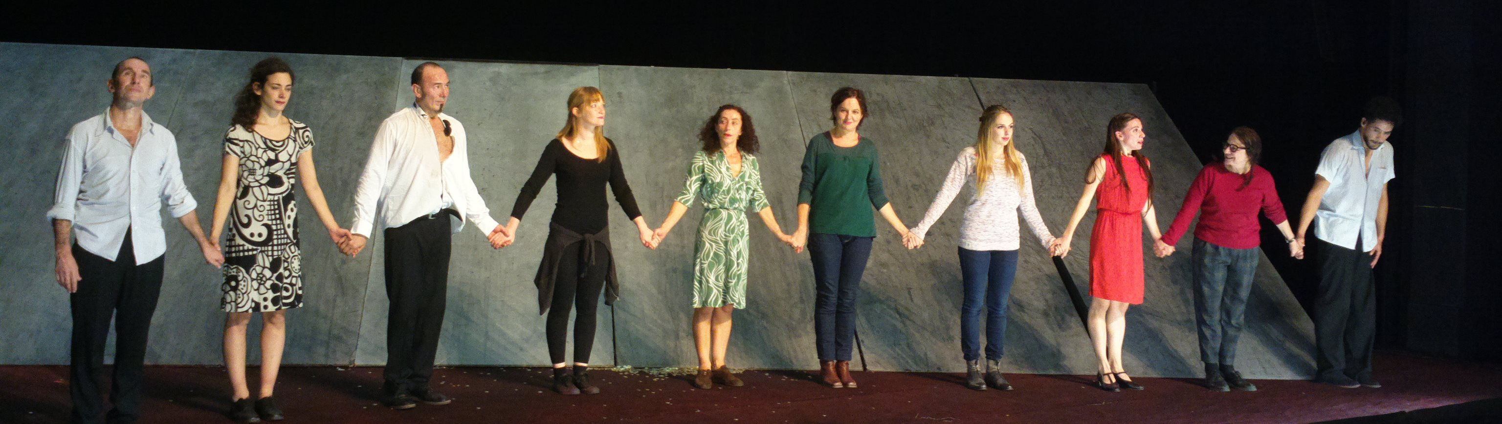 Maguy Marin (2ème en partant de la droite) dans BiT au Théâtre des Abbesses